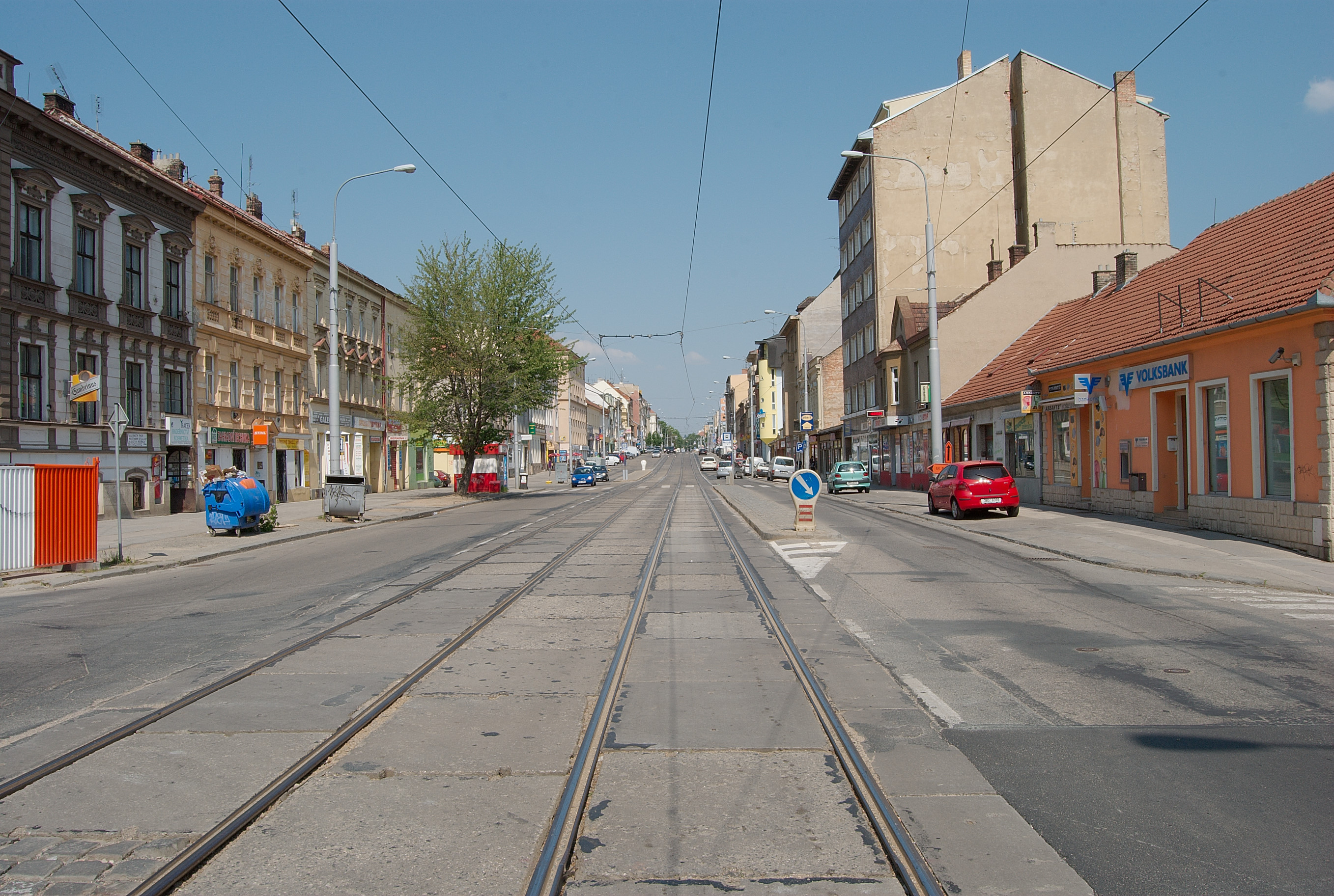 Palackého třída v Králově Poli, vyfotografovaná jižně od radnice městské části Brno-Královo Pole.